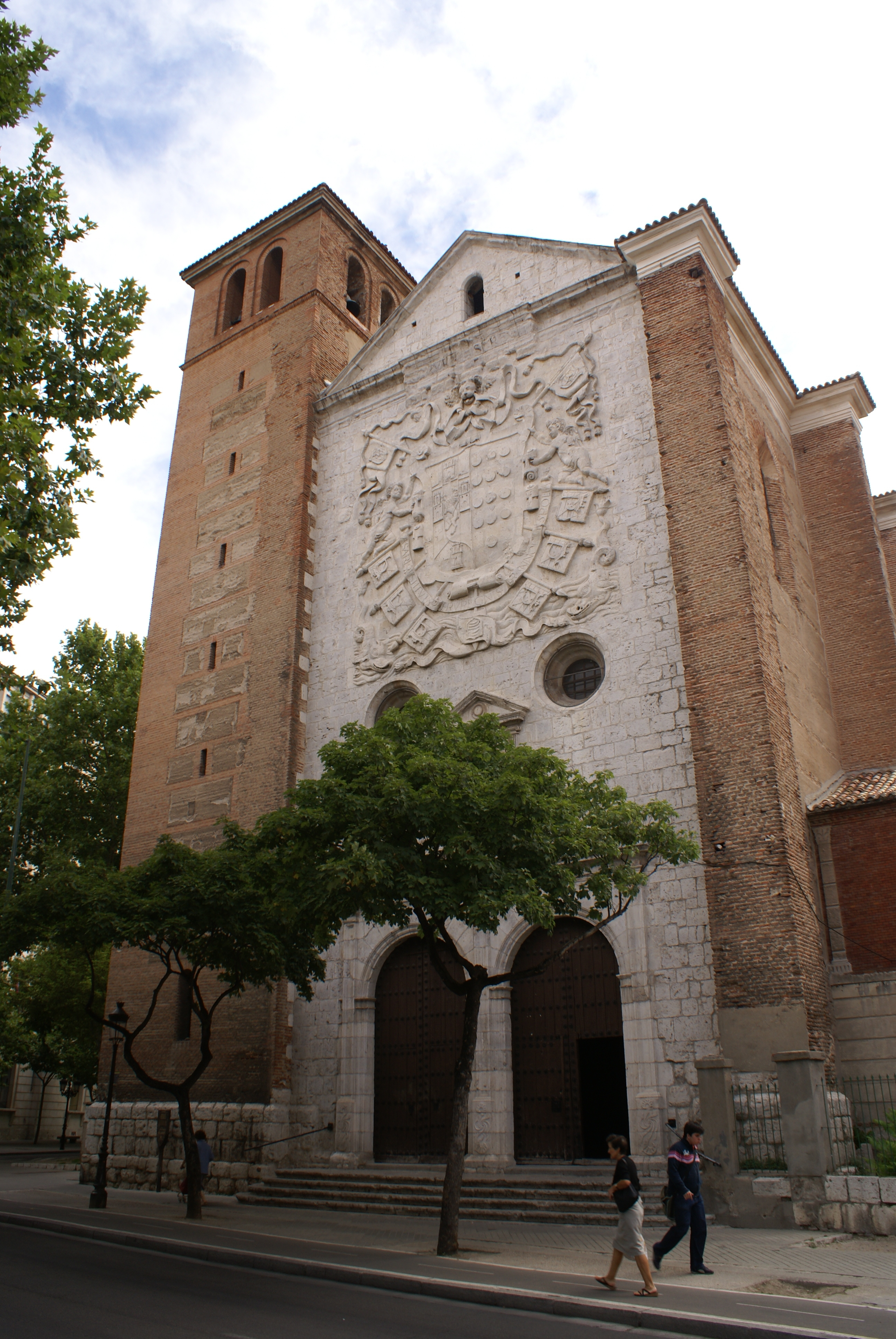 Valladolid - España (Spain) - Iglesia de Santa María Magdalena: Reedificada en el año 1566 siguiendo los planos del arquitecto Rodrigo Gil de Hontañón. Destaca en su fachada de estilo renacentista, con el inmenso escudo en piedra del pacificador del Perú, el obispo Pedro de la Gasca.